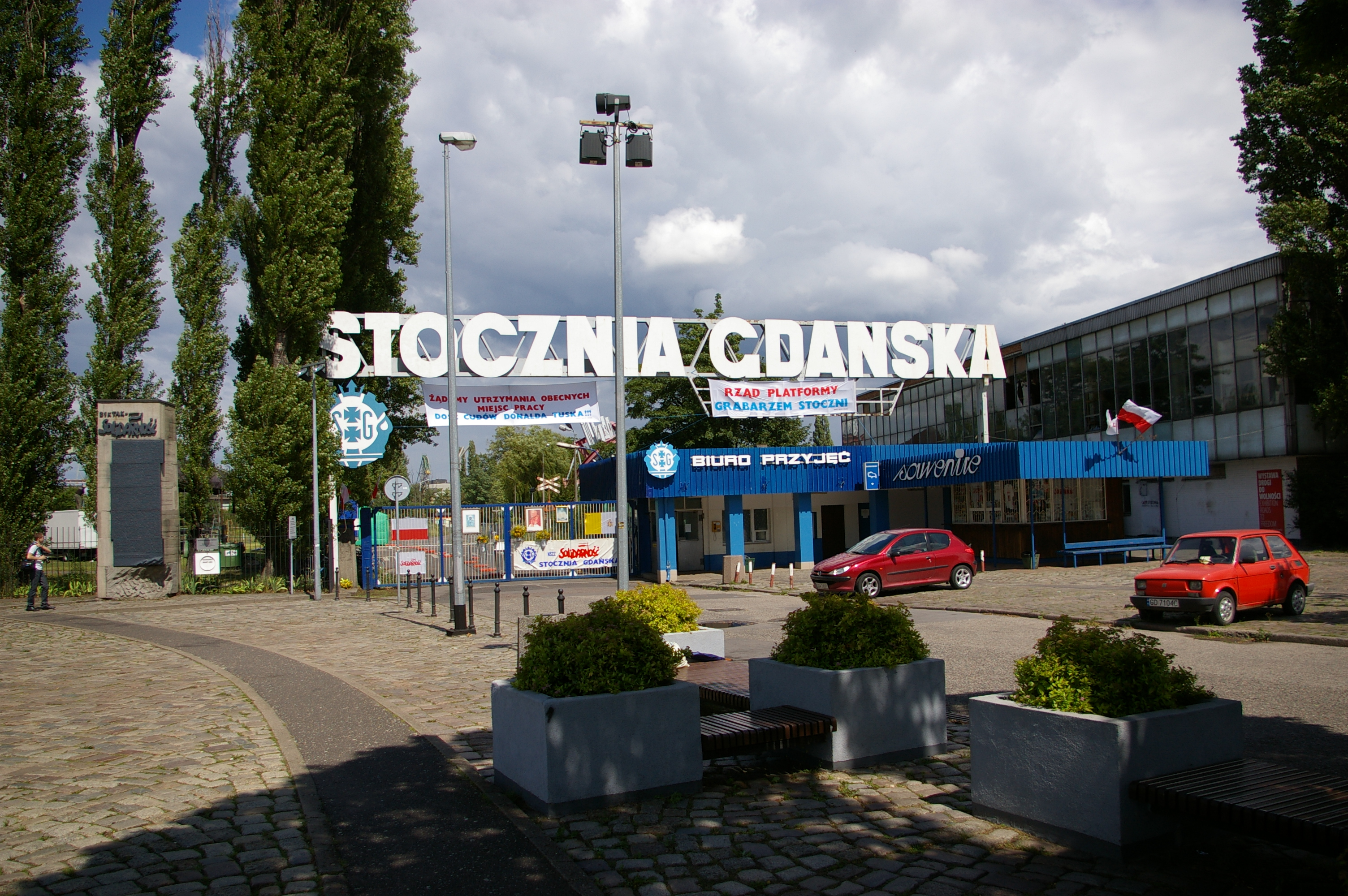 Brama Stoczni Gdańskiej